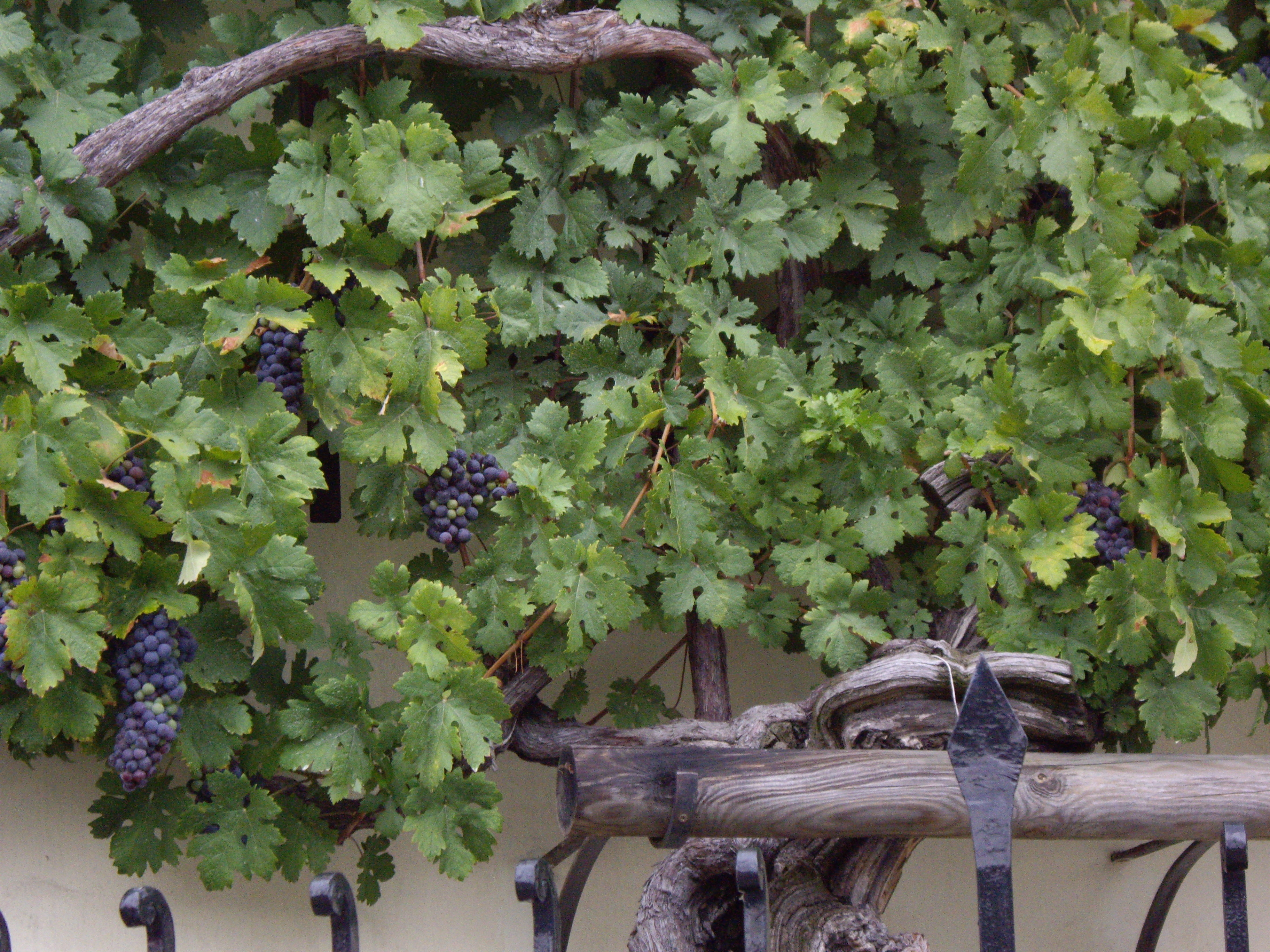 La plej malnova vito de la mondo ĉe la bordo de rivero Dravo en Mariboro